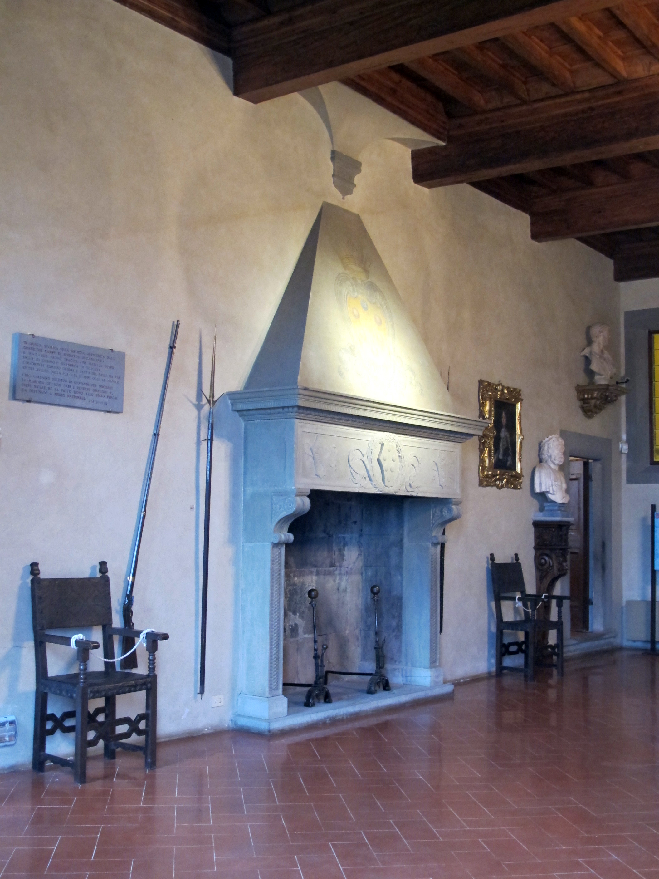 Villa di carreto guidi, interno